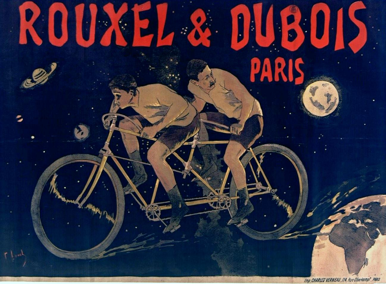 1895 affiche ROUXEL et DUBOIS